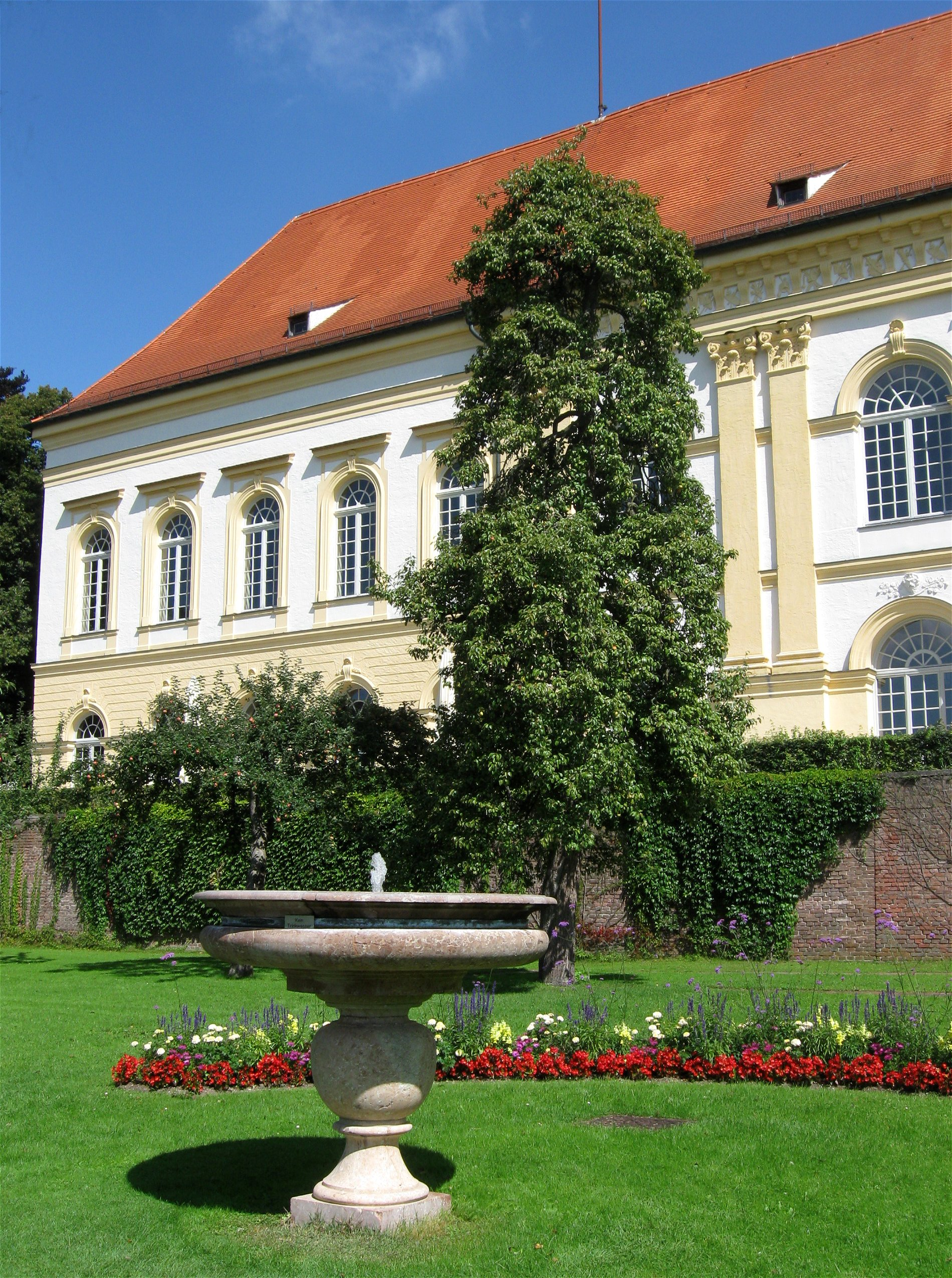 Schloss Dachau, mit Schlossgarten